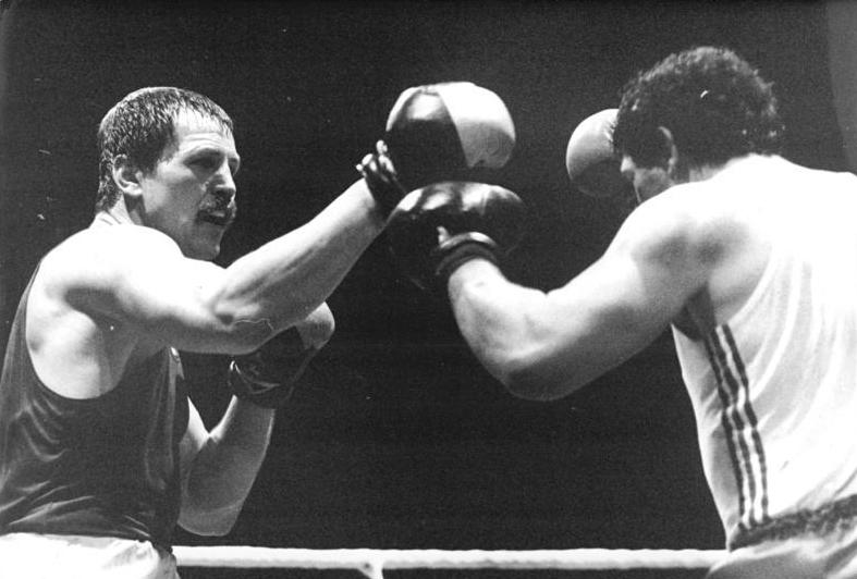 Jürgen Fanghänel, Grzegorz Skrezecz ADN-ZB Sindermann 2.3.82 Rostock: Boxländerkampf DDR-VR Polen 20:4 - Zu den Höhepunkten der Auseinandersetzungen zählte der Schwergwichtskampf. Der Olympiadritte und achtfache 30jährige DDR-Meister Jürgen Fanghänel (l.) wurde 2:1 Punktsieger über den mehrfachen Landesmeister Grzegorz Skrezecz.